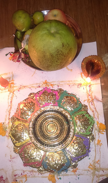 नेपाली: अष्टमङ्गलांकित मण्डल